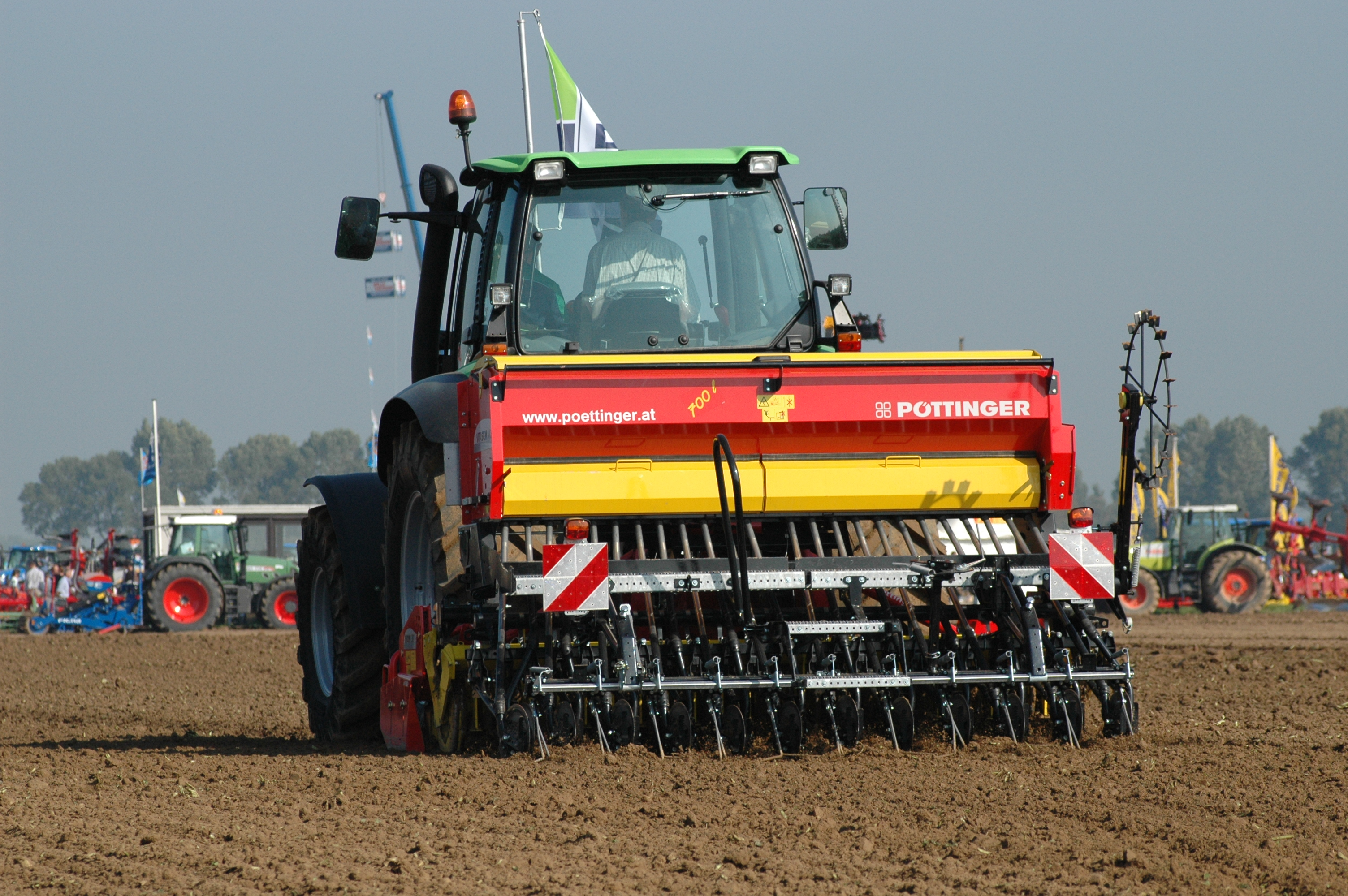 Deutz-Fahr-Traktor mit Pöttinger-Sämaschine